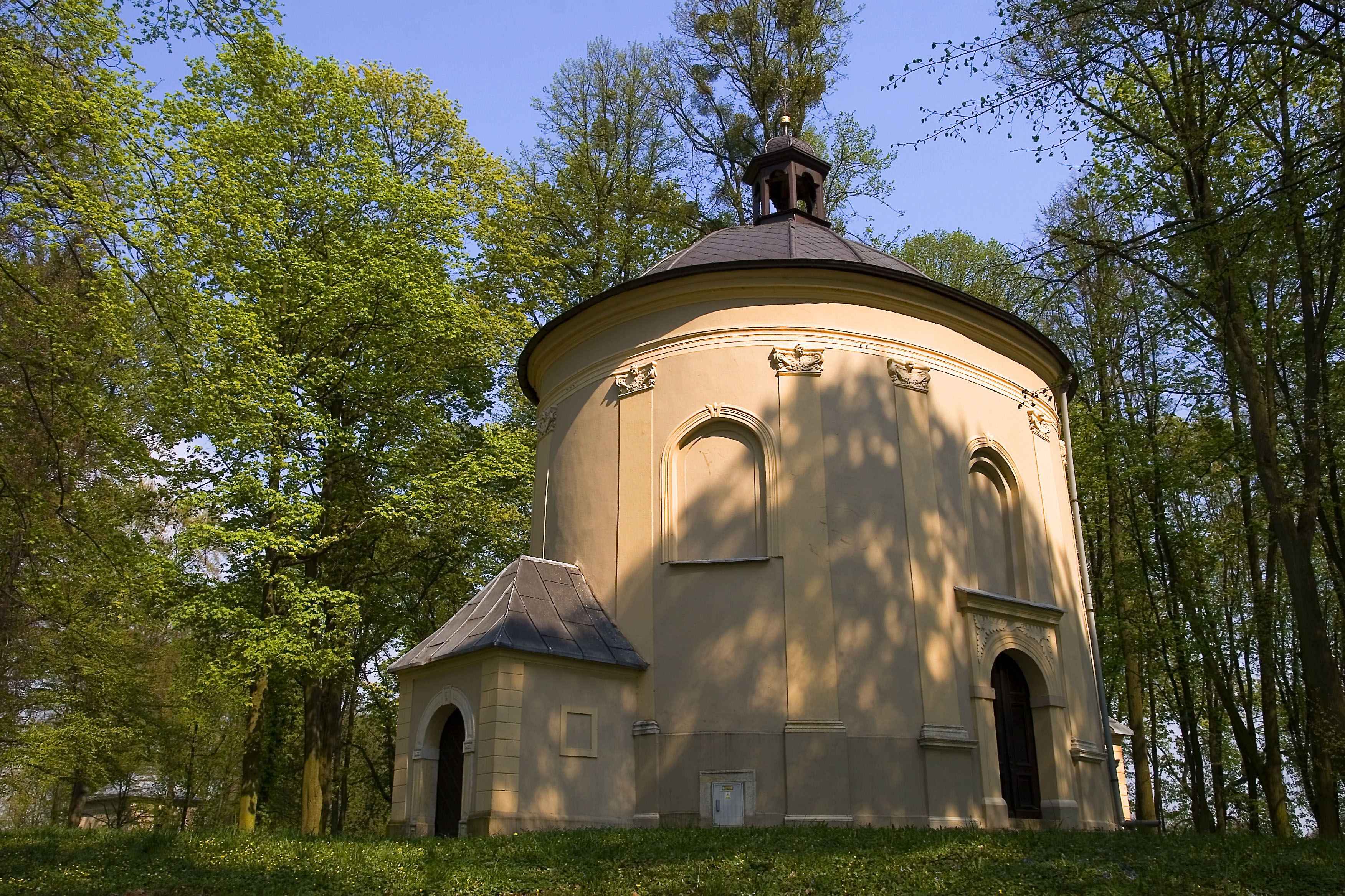 Góra św. Anny, kaplica Dom Kaifasza, Gmina Leśnica, powiat strzelecki